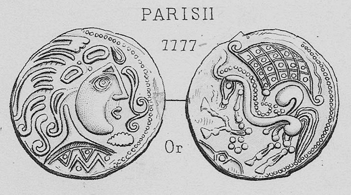 Statère des parisii, type 7777 de Henri de La Tour, classe V. Gravure par Léon Dardel. Publié en 1892, Atlas des monnaies de Gaule, planche XXXI.